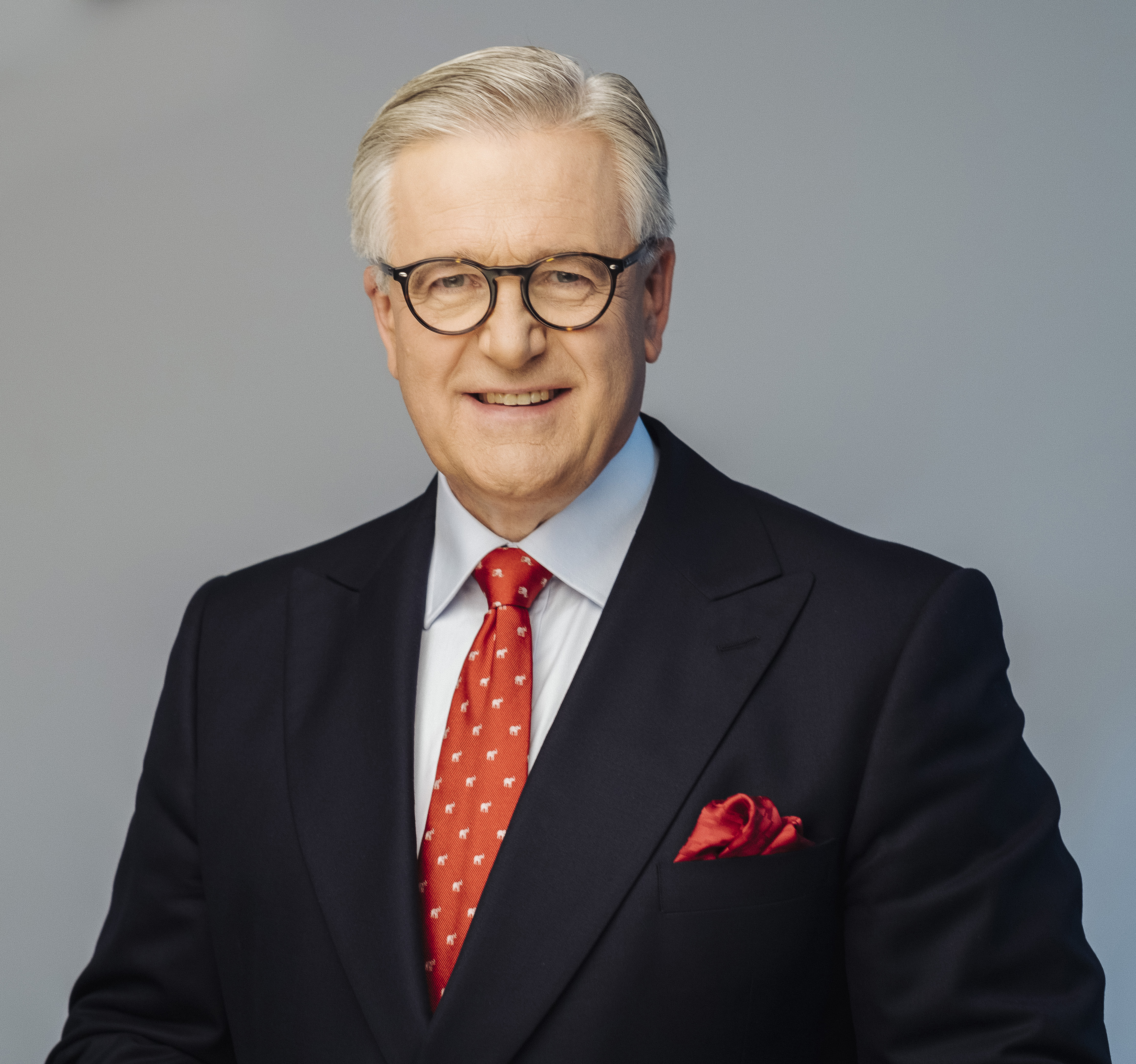 Najbardziej aktualne zdjęcie Jarosława W. Laseckiego z 2019 roku.